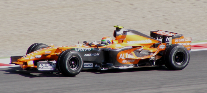 Sakon Yamamoto in Monza 2007